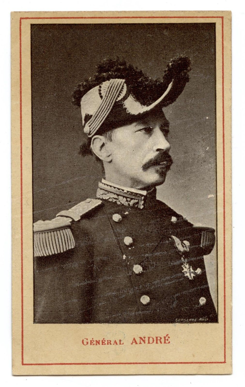 Le général André. Chromolithographie / image publicitaire imprimée sous forme de carte rectangulaire.